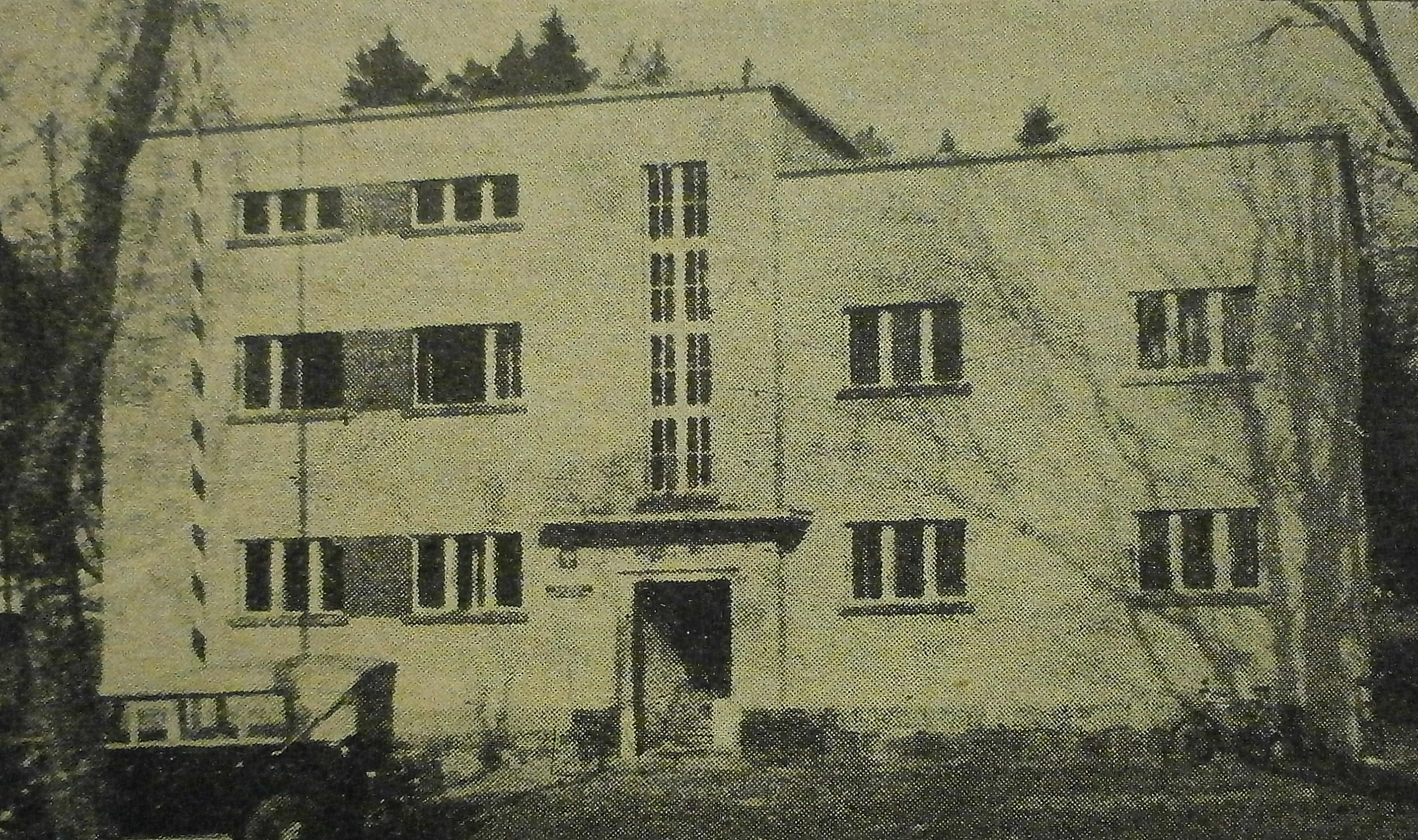 placówka Straży Granicznej Chośnica w 1936 roku